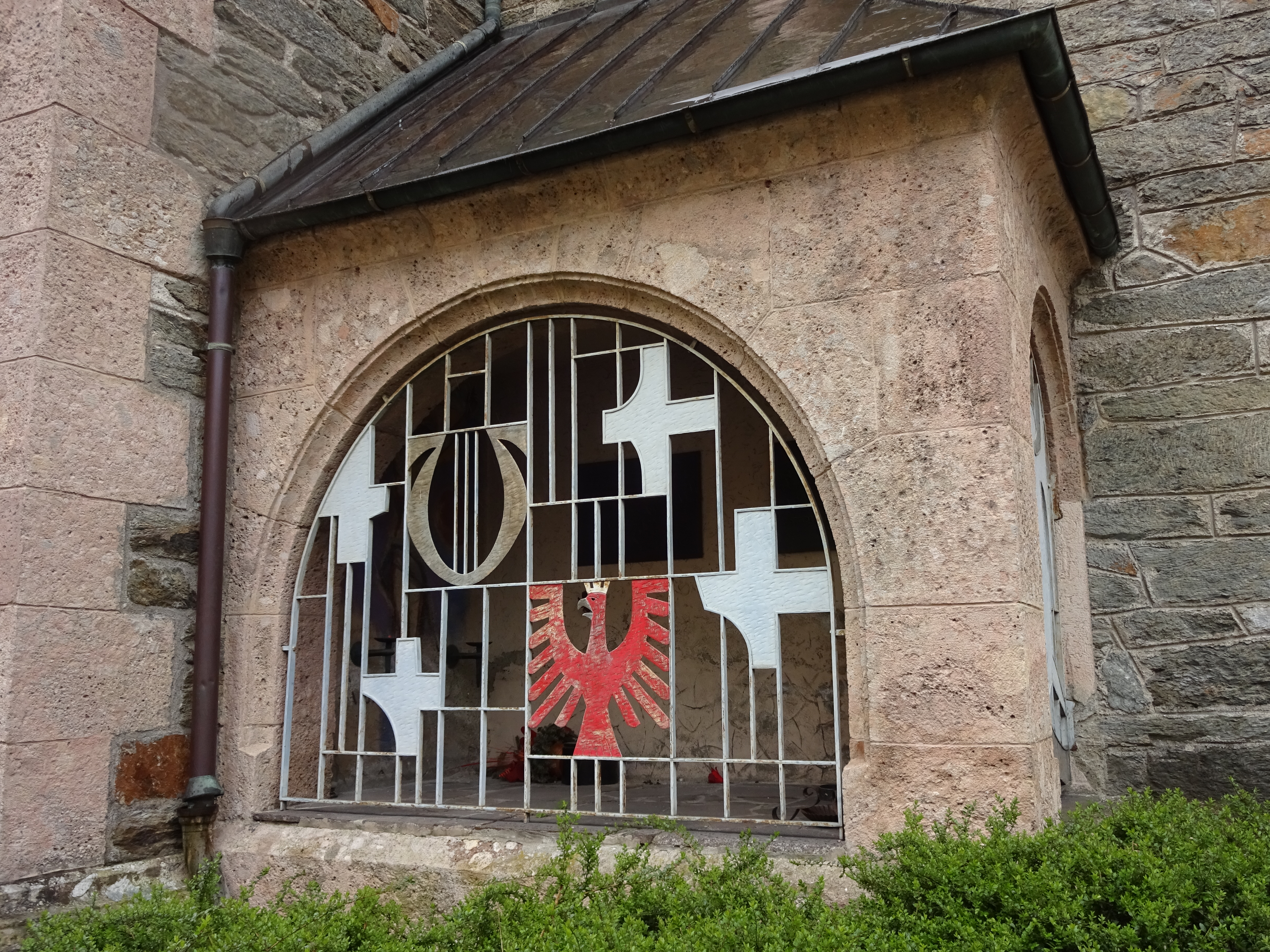 Totengedenkkapelle an der Nordseite der Pradler Pfarrkirche, gestaltet 1967/68 von Emmerich Kerle